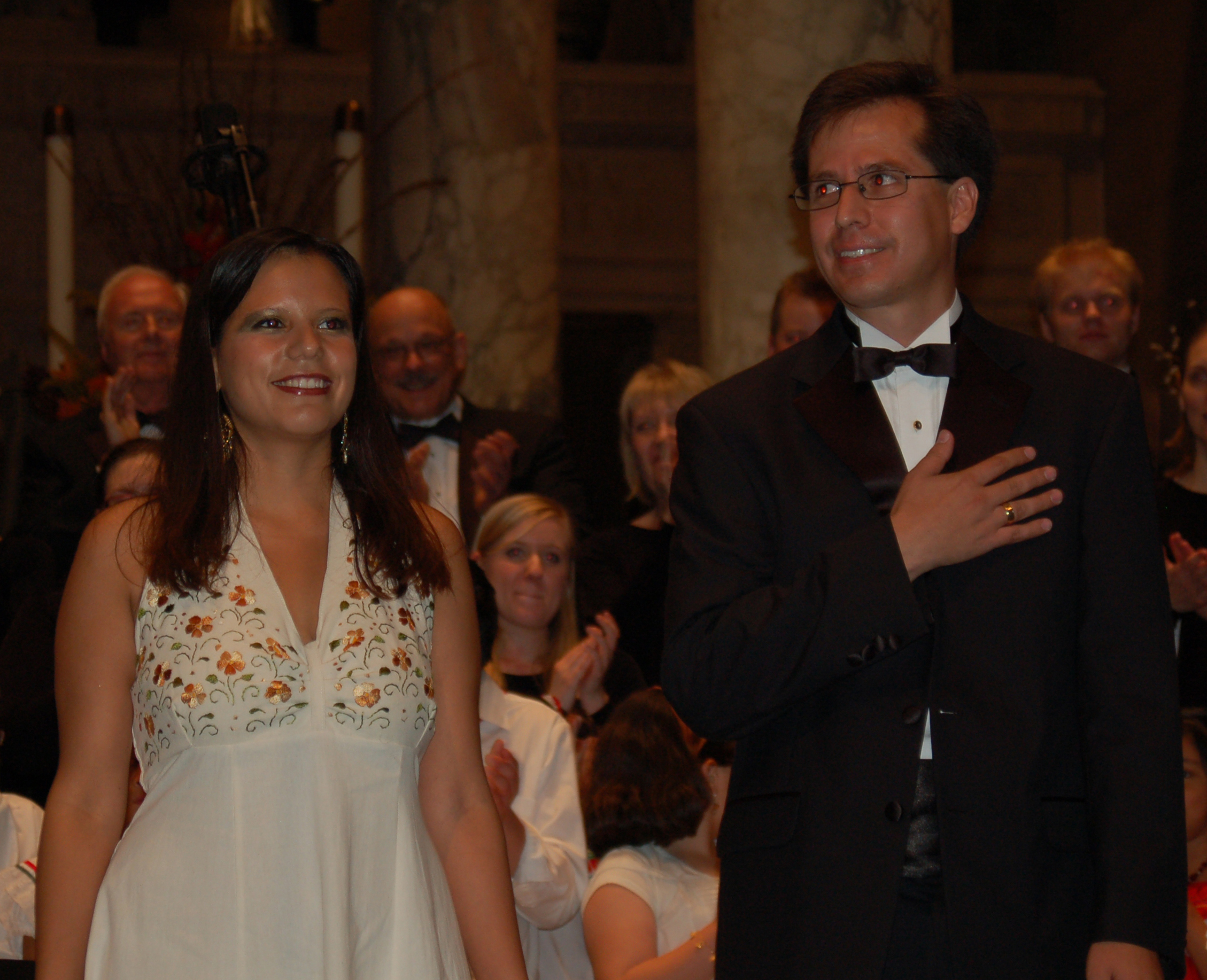 2010 ¡Cantaré! Composers Diana Syrse and Jesús López